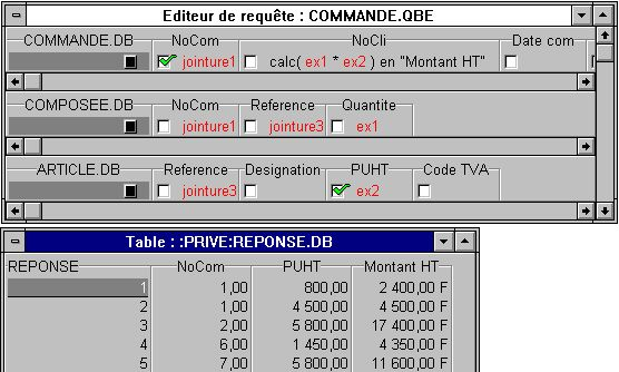 Exemple de requête QBE avec jointures dans le logiciel Paradox de Borland